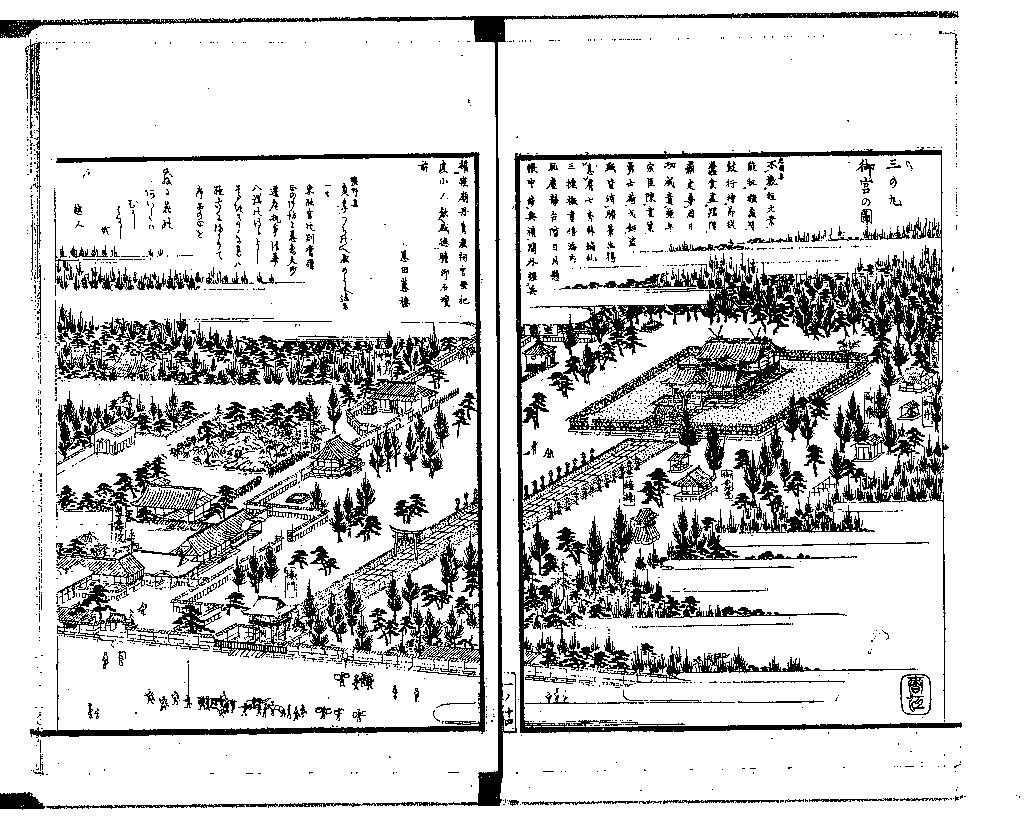 焼失前の名古屋東照宮（『尾張名所図会. 前編 巻１ 愛智郡』より「三の丸 御宮の図」）